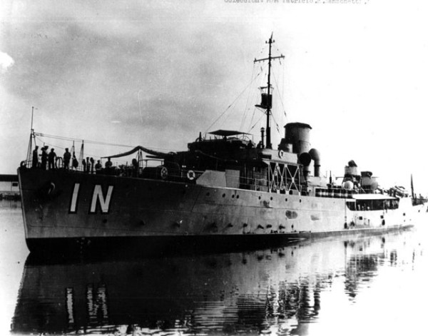 Corbeta Independencia (ex Dunvengan) clase Flower de la Armada Venezolana, finales década de 1940